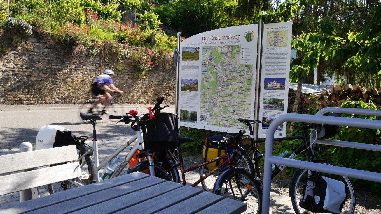 Rastplatz mit Streckentafel in der Vorstadtstraße unterhalb des Graf-Eberstein-Schlosses in Kraichtal-Gochsheim